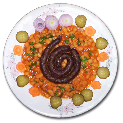 Fasole cu carnati, a traditional Romanian dish